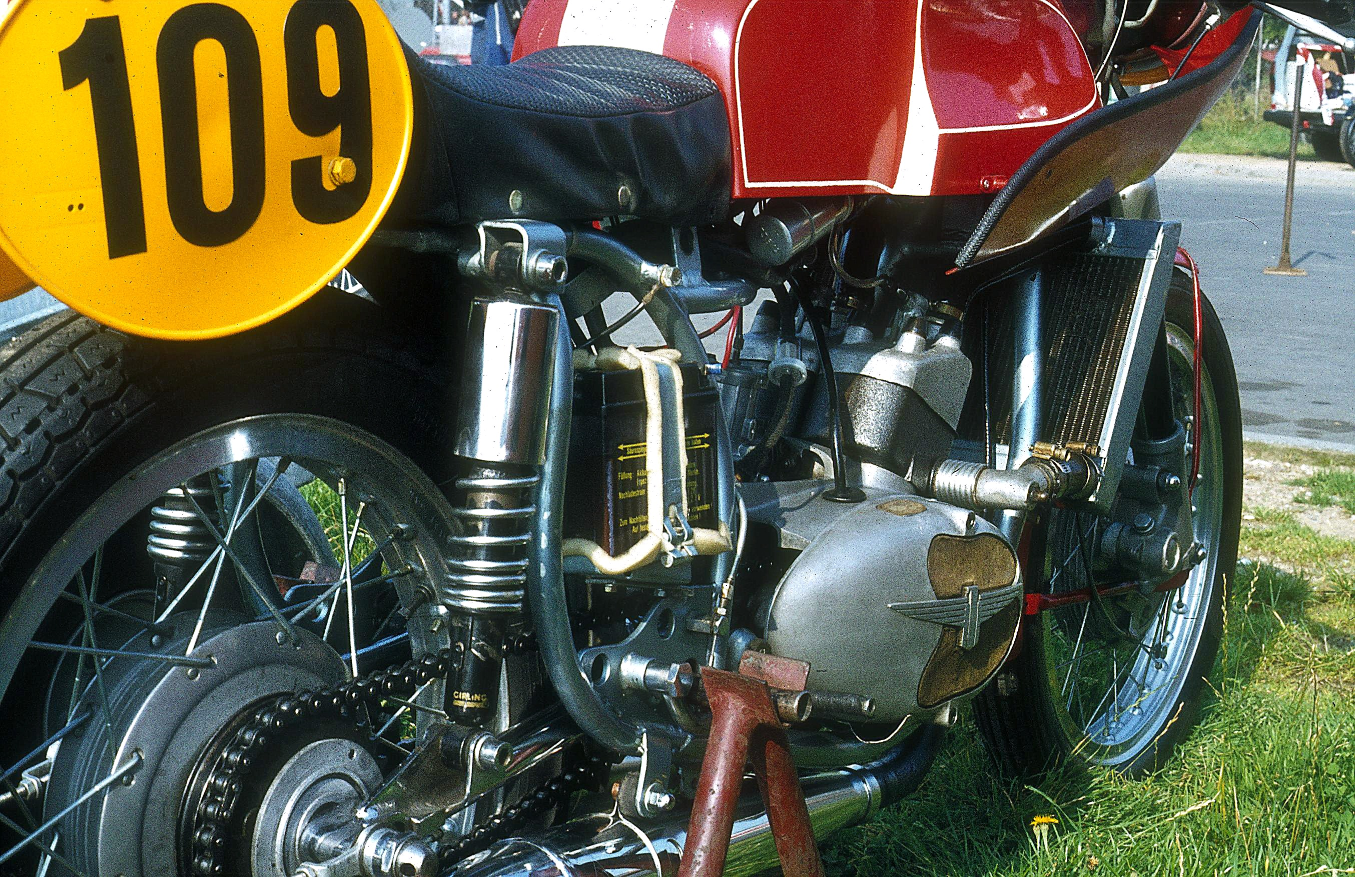 Adler RS 250 mit wassergekühltem Motor, gebaut um 1955